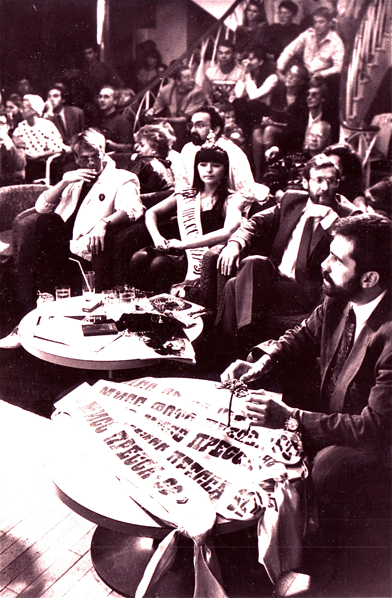 Miss Pressa